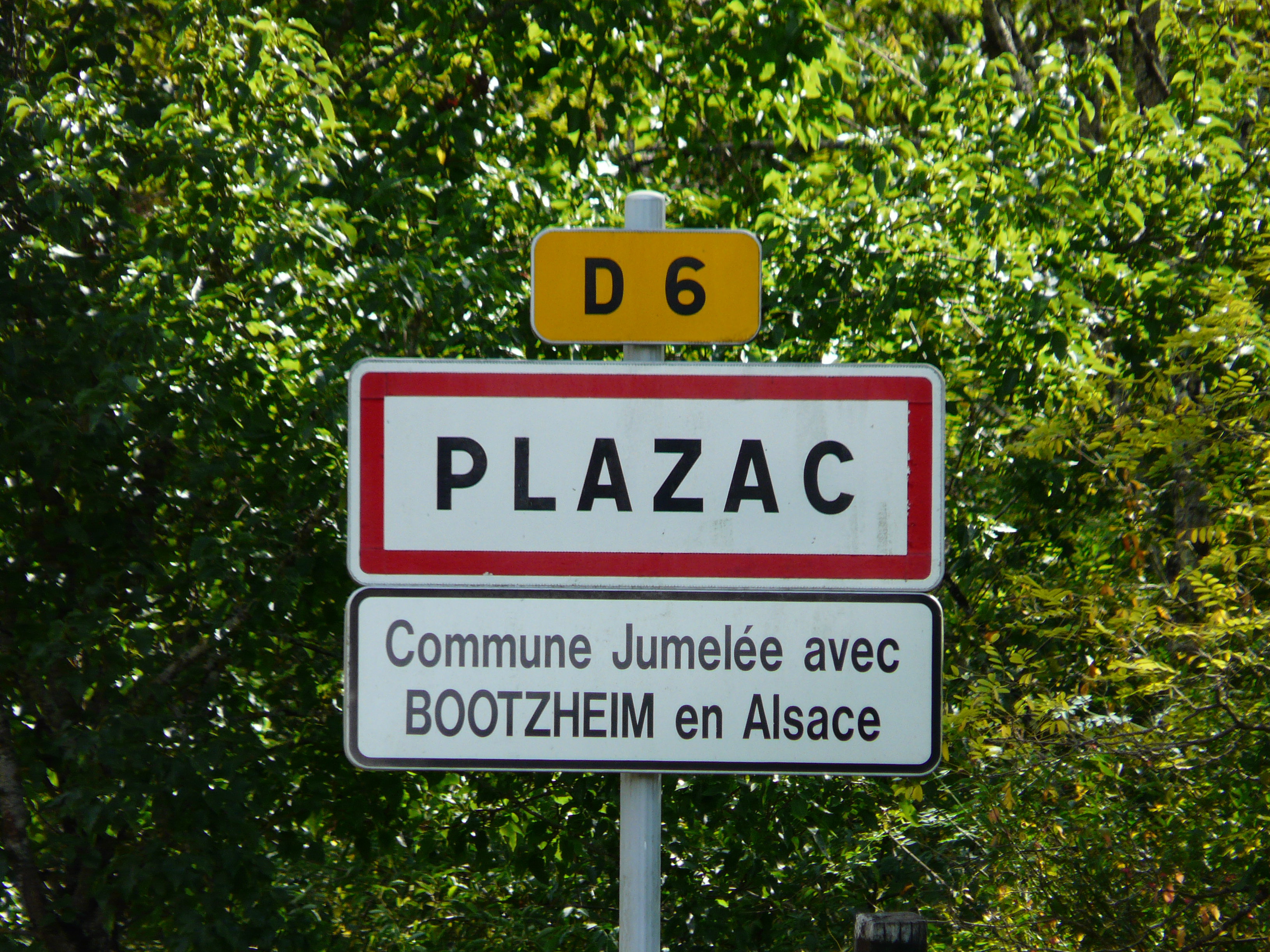 Panneau d'entrée dans le village de Plazac, Dordogne, France.